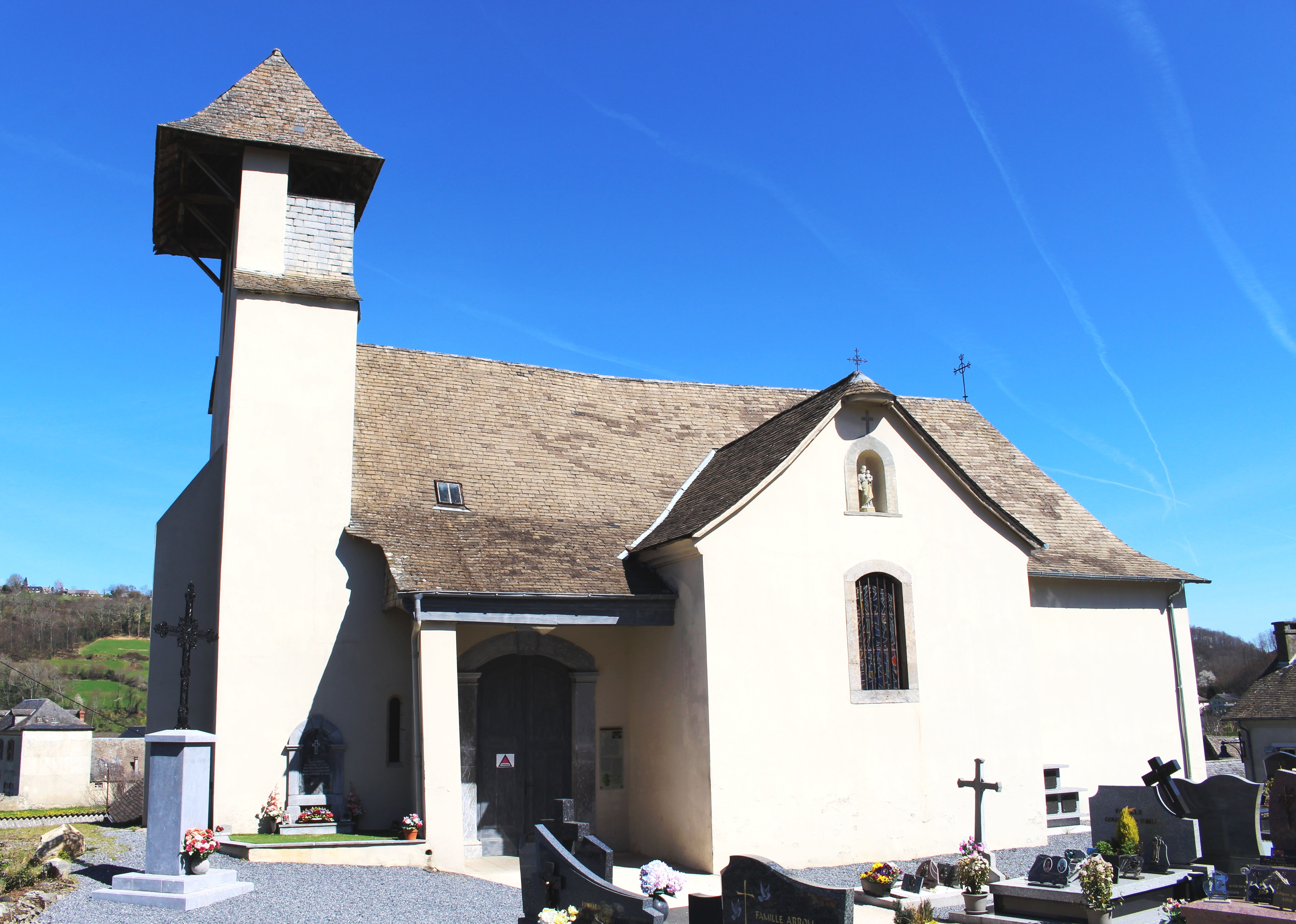 Église Saint-Caprais d'Arcizac-ez-Angles (Hautes-Pyrénées)